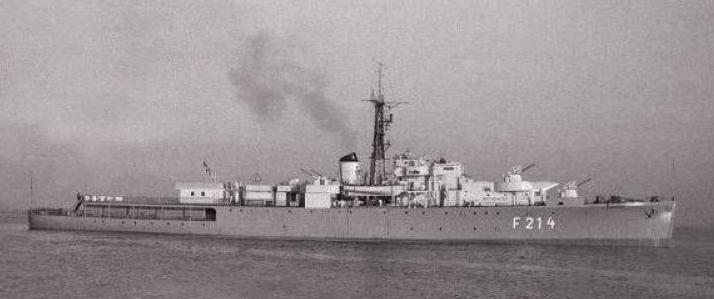 Die deutsche Schulfregatte Hipper (F214)